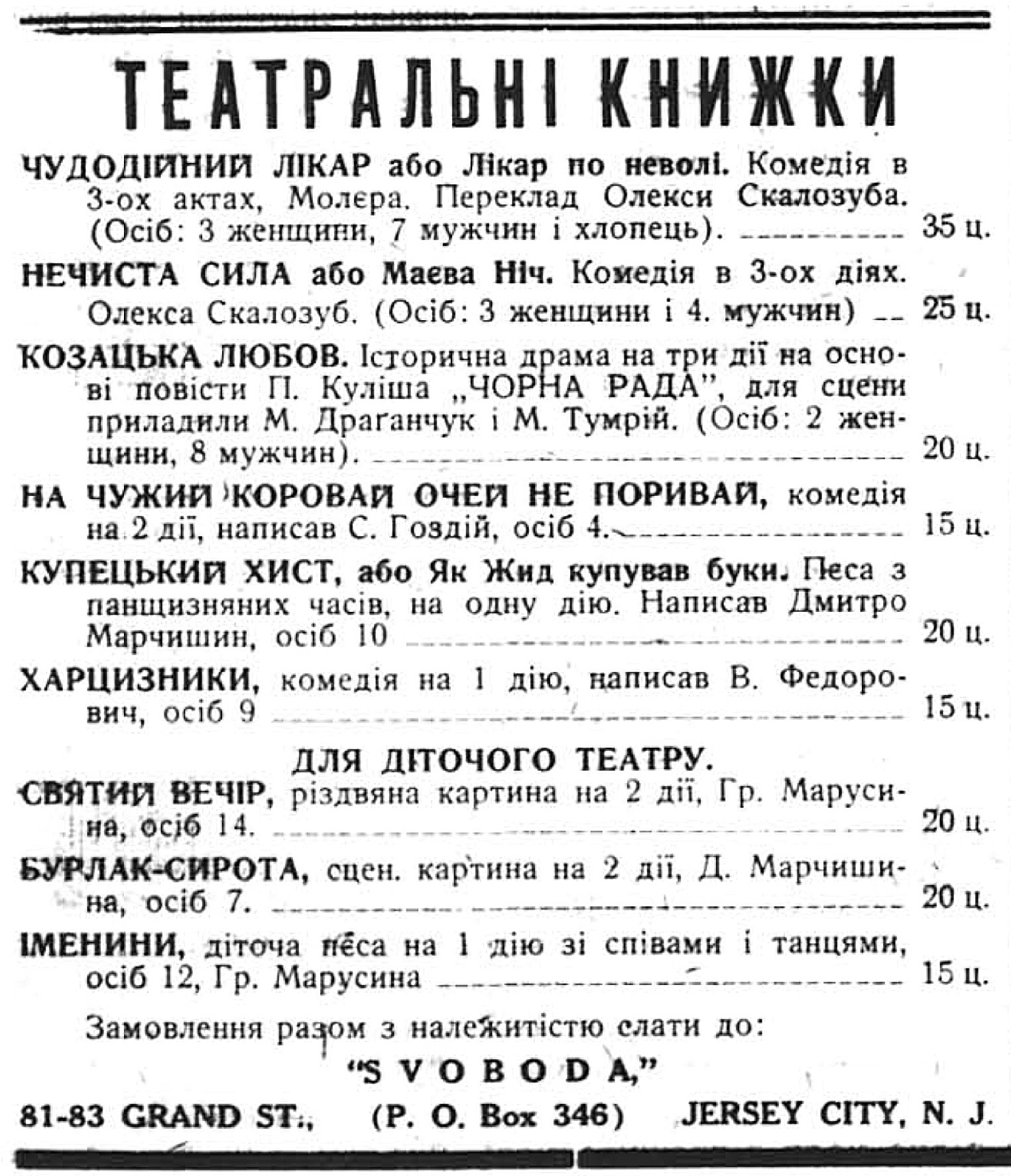 Перелік постанов у газеті «Свобода», вівторок, 13 листопада, 1934.